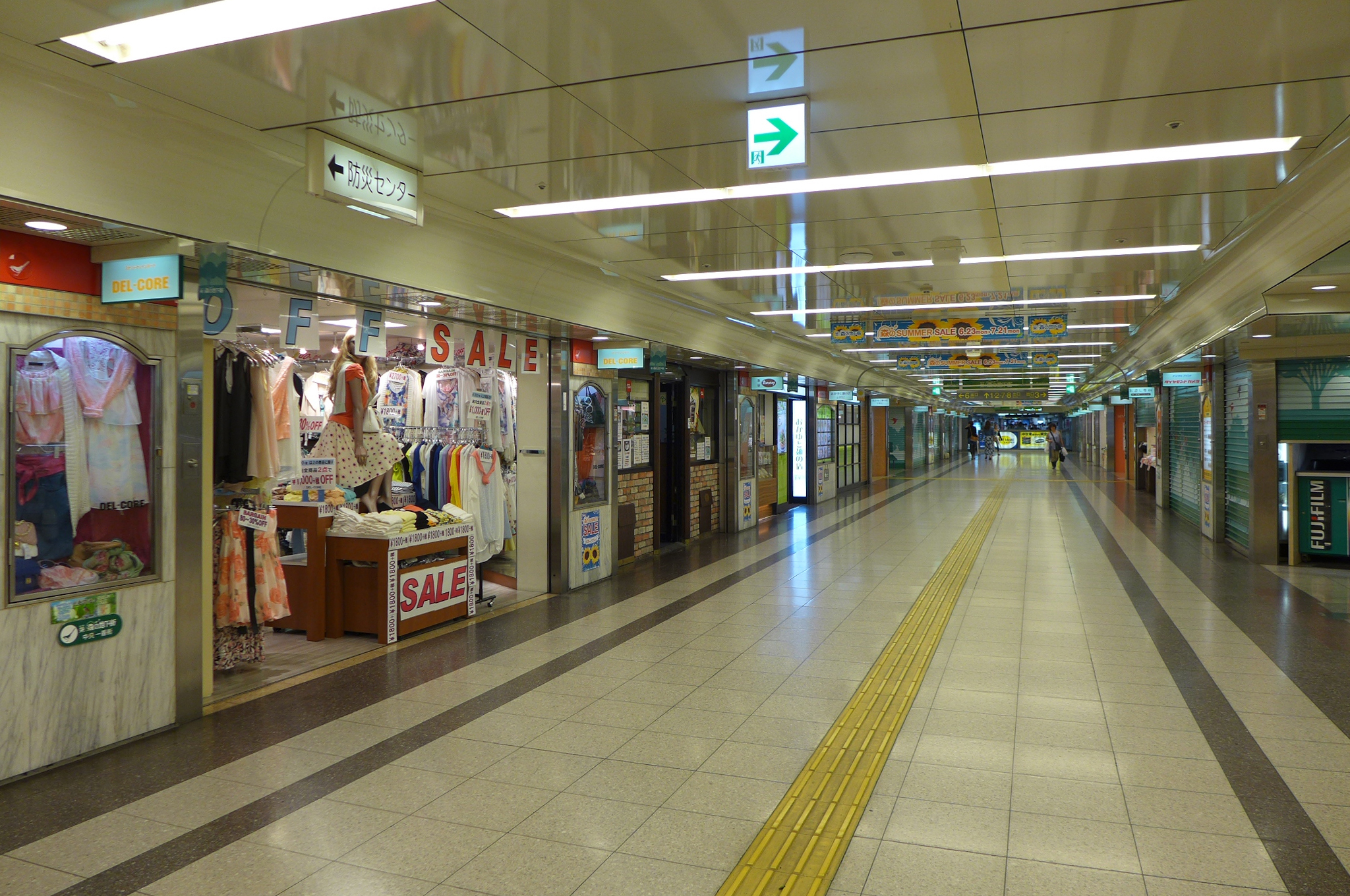 森の地下街